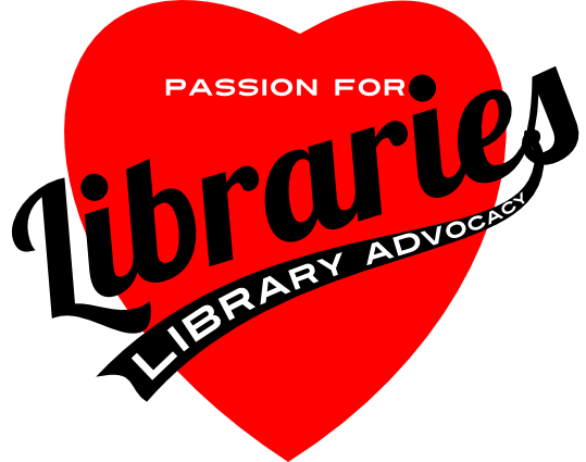 Passion pour les bibliothèques